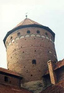 zdj. własne